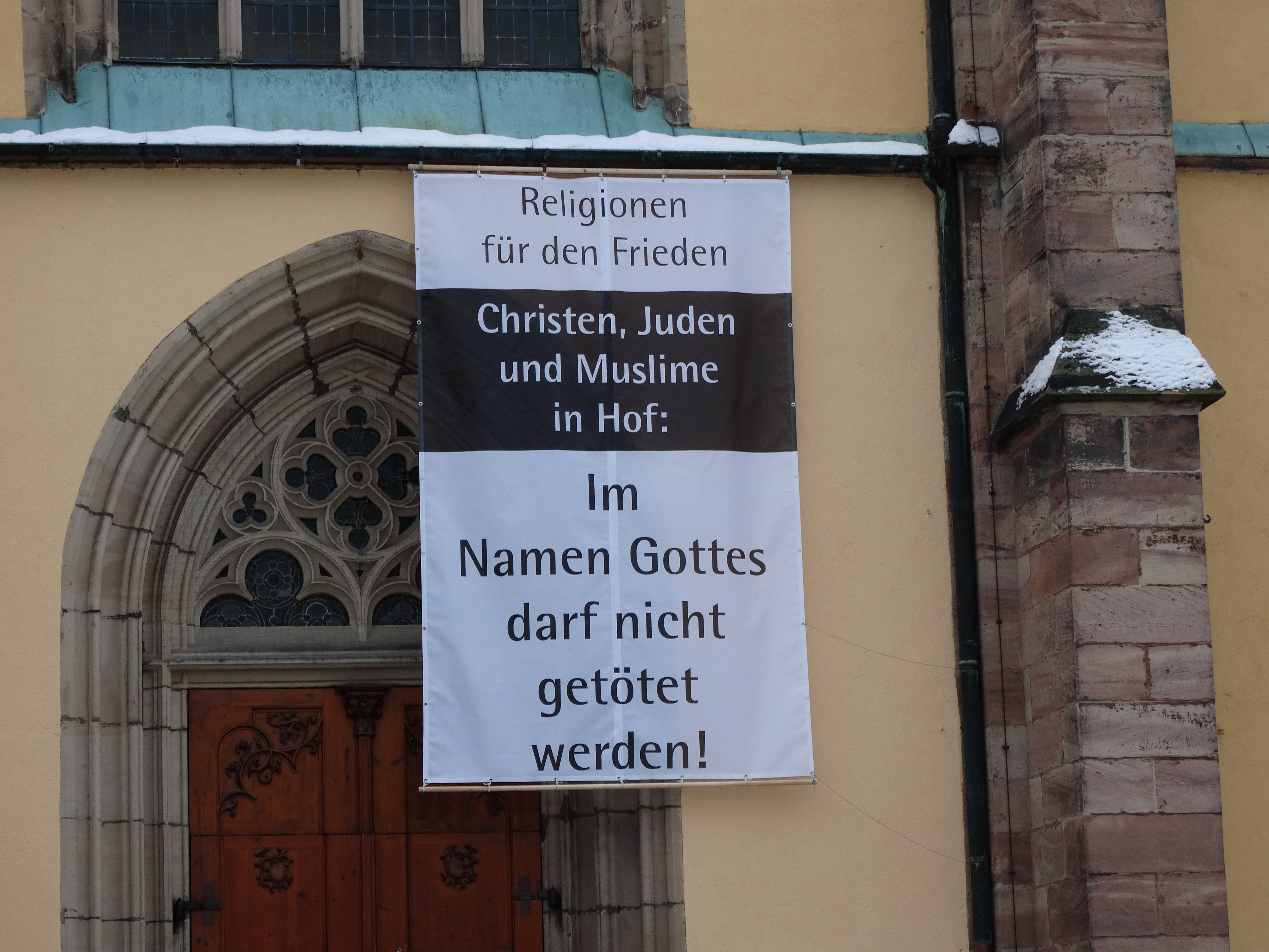 Plakat Religionen für den Frieden. Aktion der Religionsgemeinschaften in Hof an der Saale (Februar 2015)